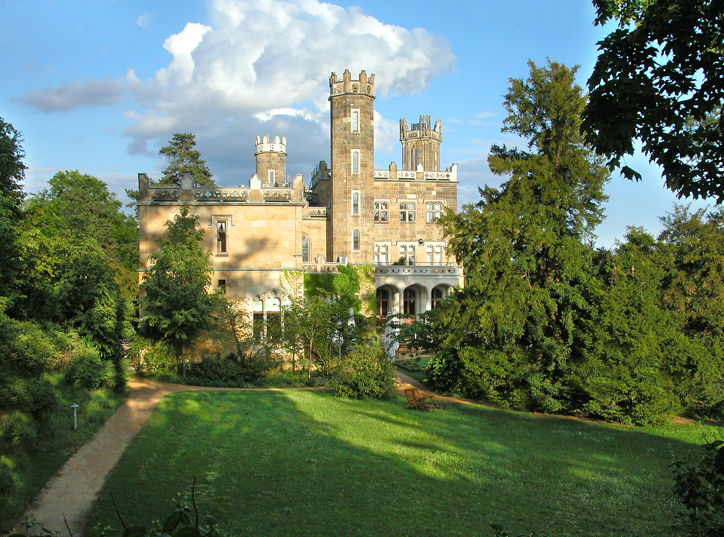 17.05.2007 01099 Dresden, Bautzner Str. 134 (GMP: 51.063566,13.799471): Schloß Eckberg (Villa Souchay), 1859-1861 von Ch. F. Arnold. Sicht von Westen. Heute Hotel. [DSCN27979.TIF]20070517010DR.JPG(c)Blobel